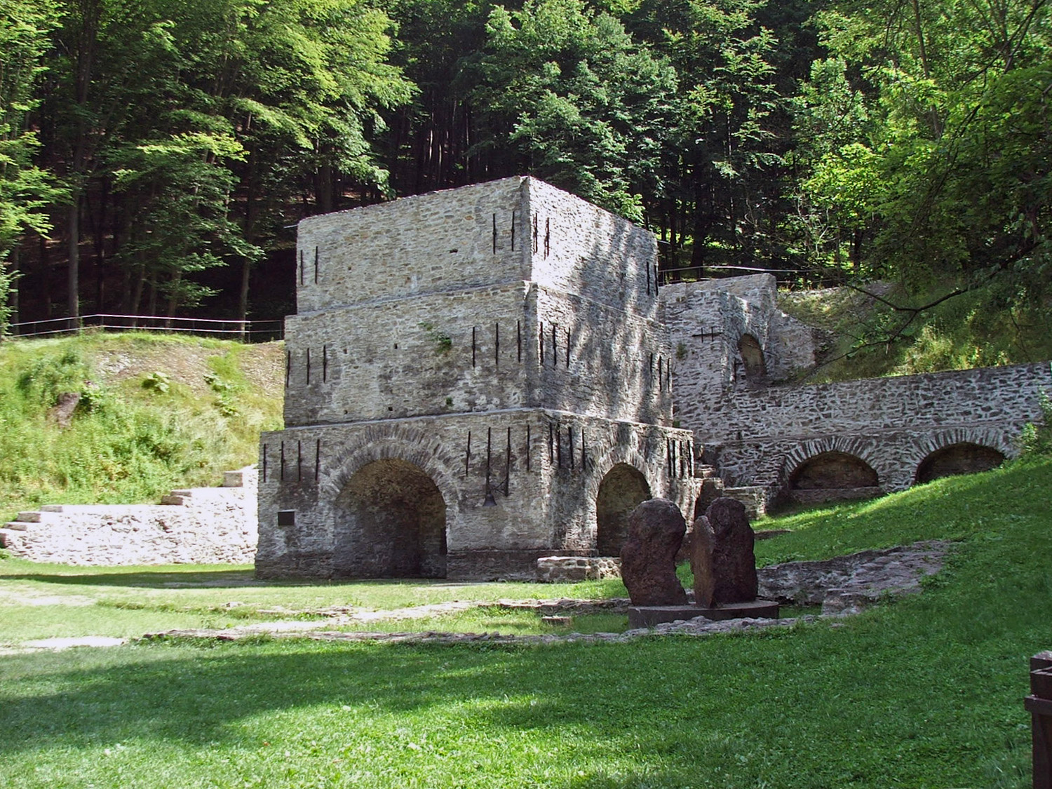 Őskohó (Miskolc, ÓMASSA) This is a photo of a monument in Hungary, Identifier: 2991